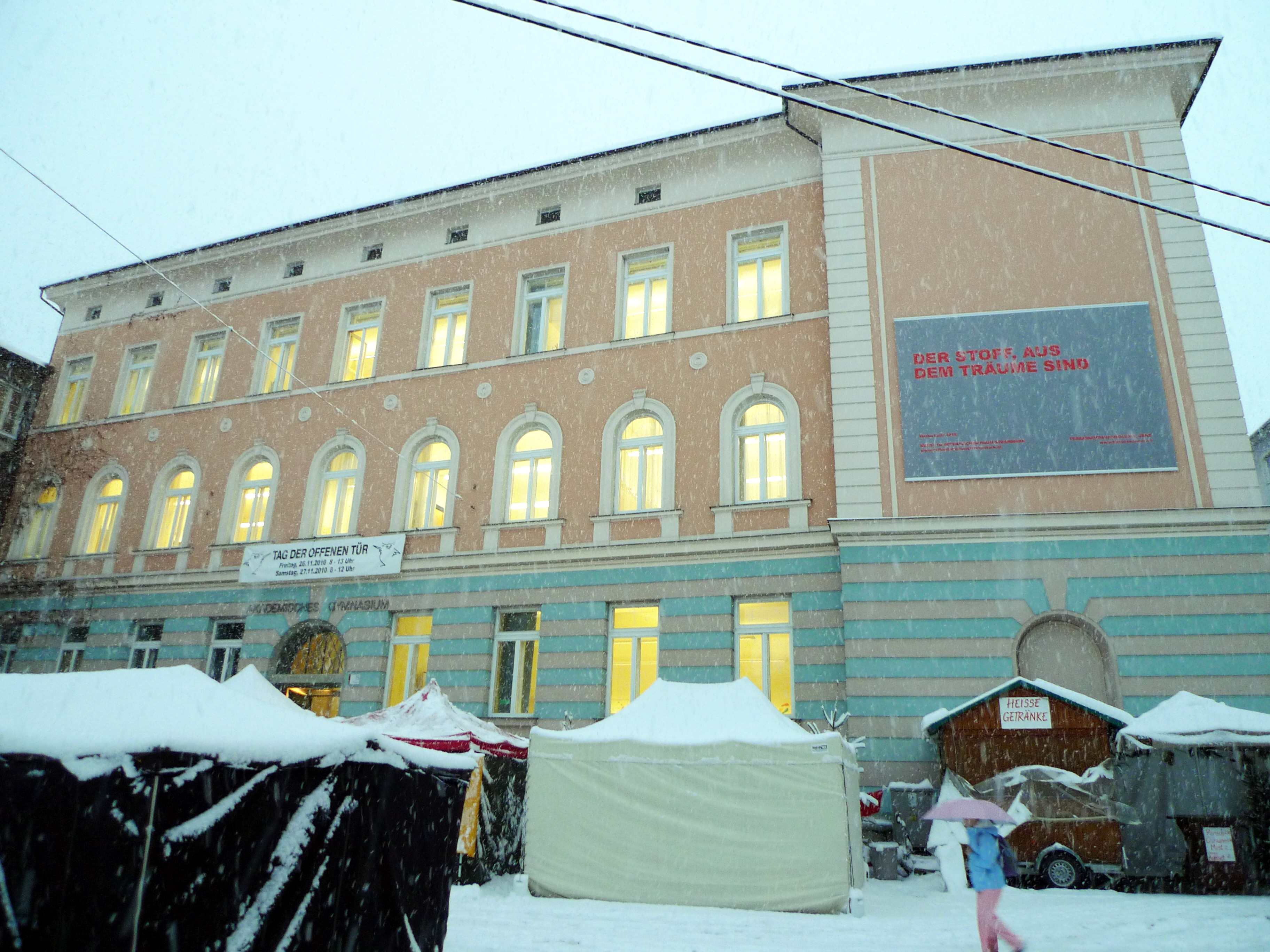 Akademisches Gymnasium Graz, Dezember 2010